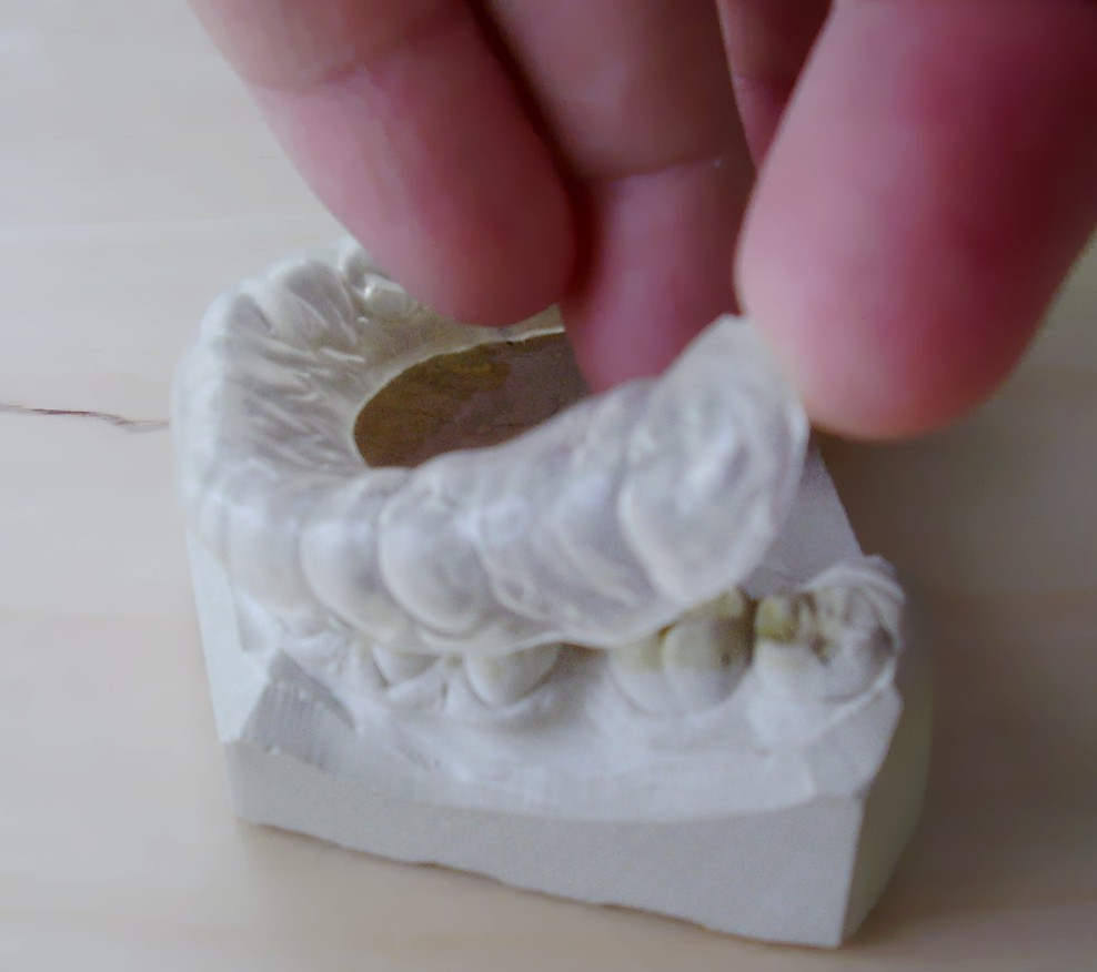 Aufbissschiene für den Unterkiefer